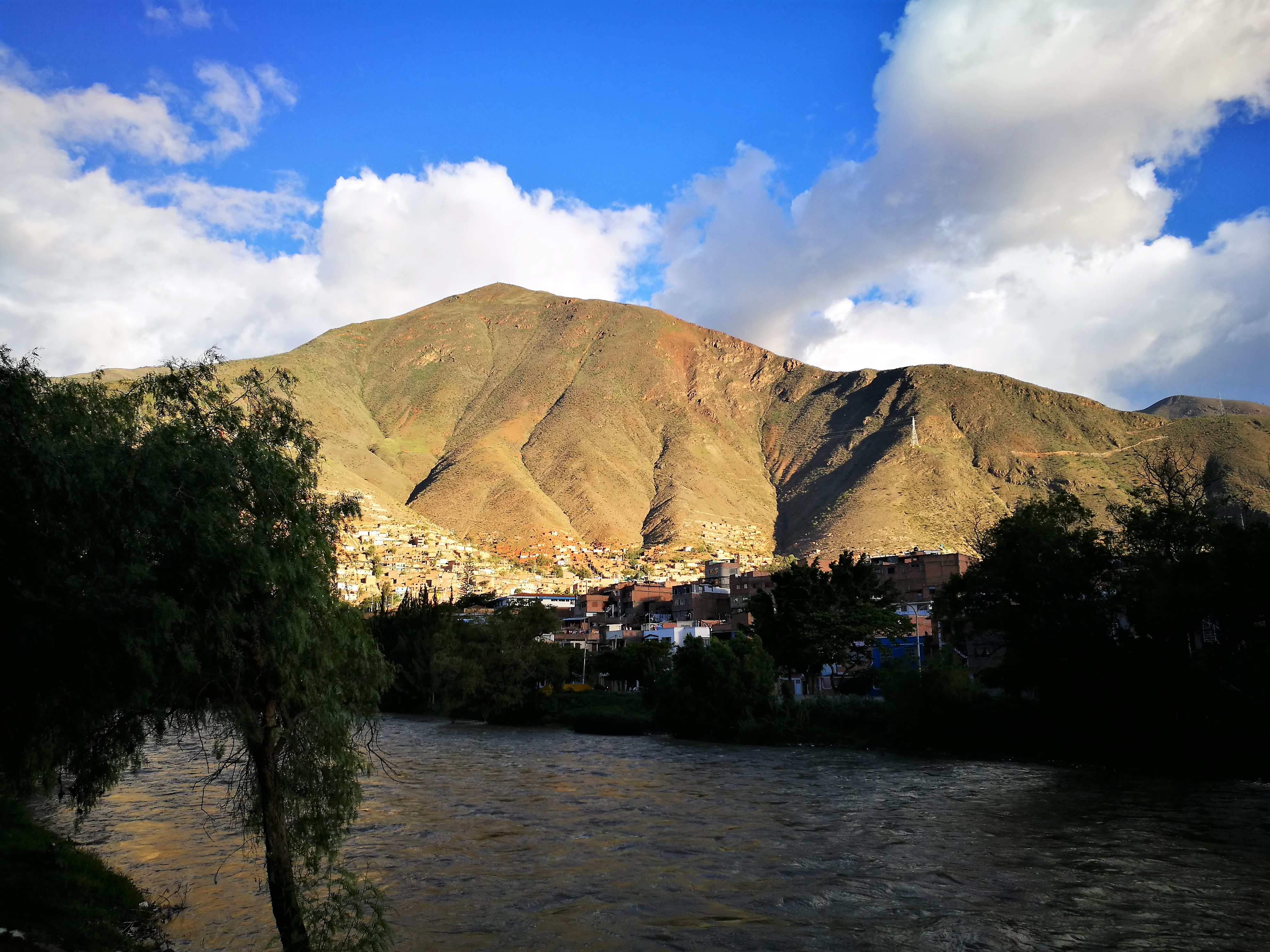 ¨Riu Huallaga a Huánuco des del Malecón Alomia Robles